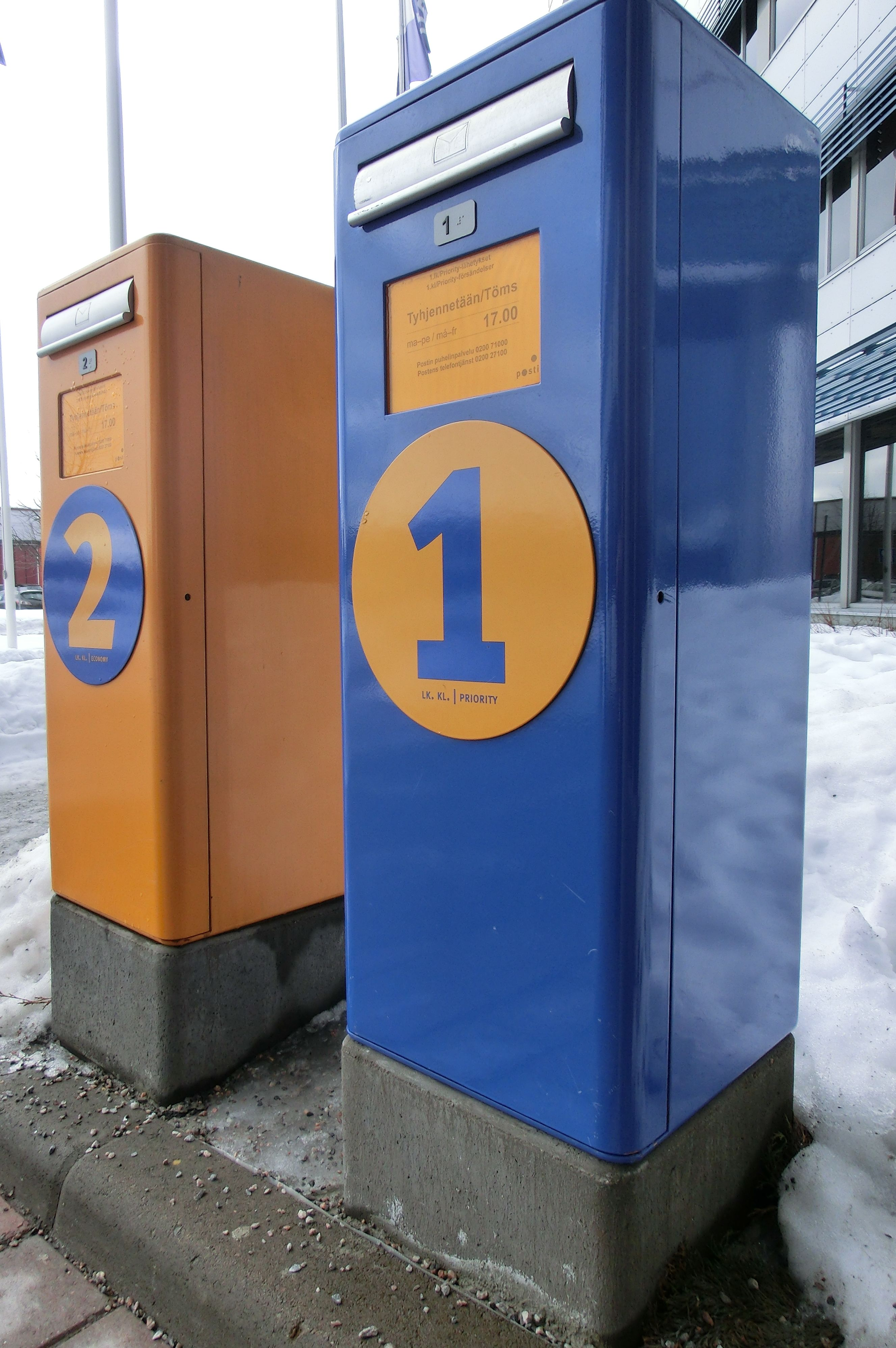 Poŝtkestoj en Helsinki, en Finnlando. La flava estas por 2a klasa leteroj kaj blua por 1a klasa leteroj.